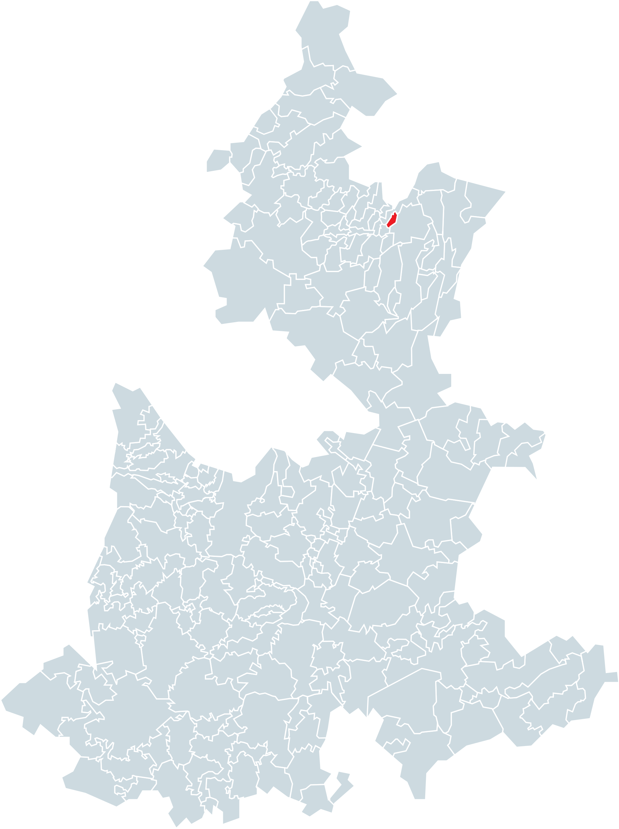 Municipio de Jonotla